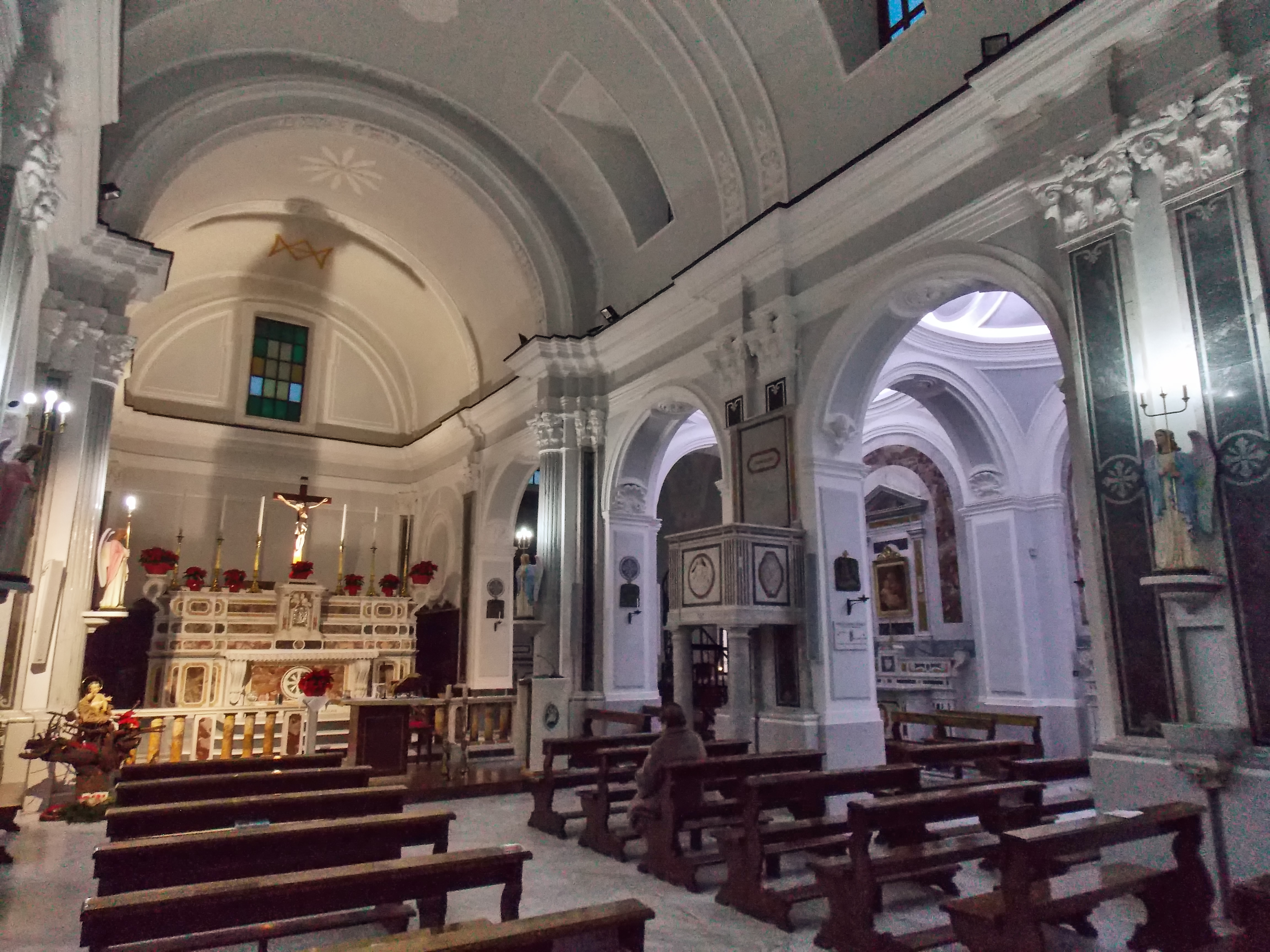 La navata centrale della chiesa parrocchiale di Santa Maria Assunta a Faicchio (BN)